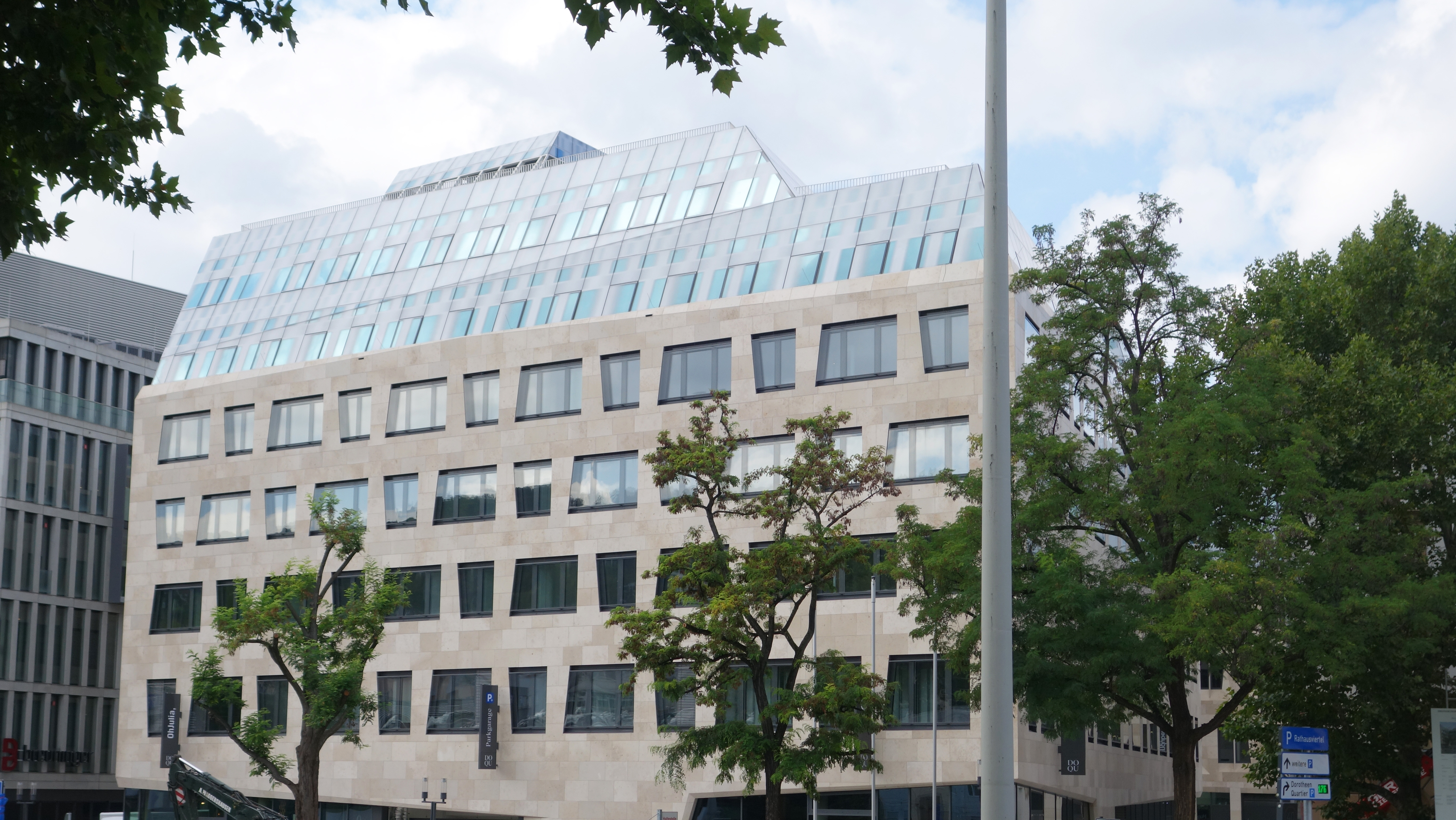 Außenansicht des Ministeriums für Soziales und Integration Baden-Württemberg in Stuttgart